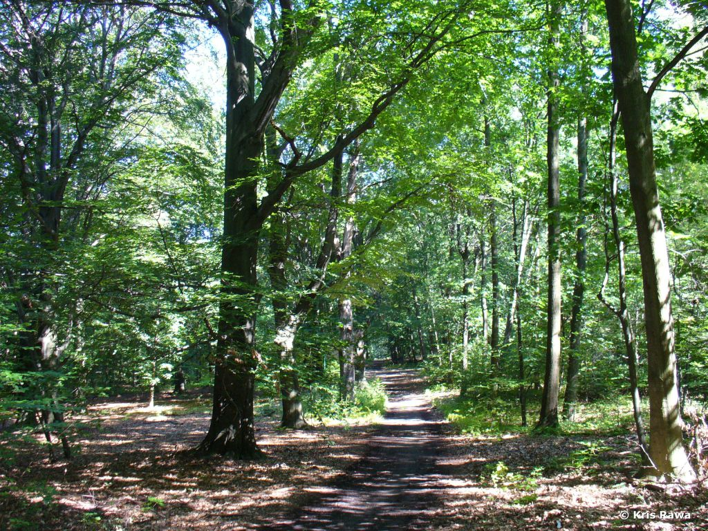 Uroczysko Buczyna